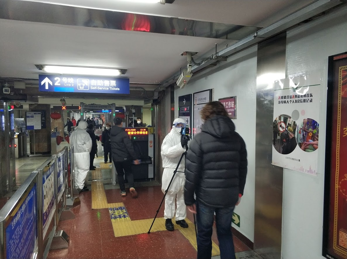 Control mèdic a l'estació de metro de Beijing railway station (Pequín) a causa de l'amenaça de coronavirus 2019-nCoV. Els operaris, vestits de blanc, prenen la temperatura a tot aquell que vulgui accedir al metro.